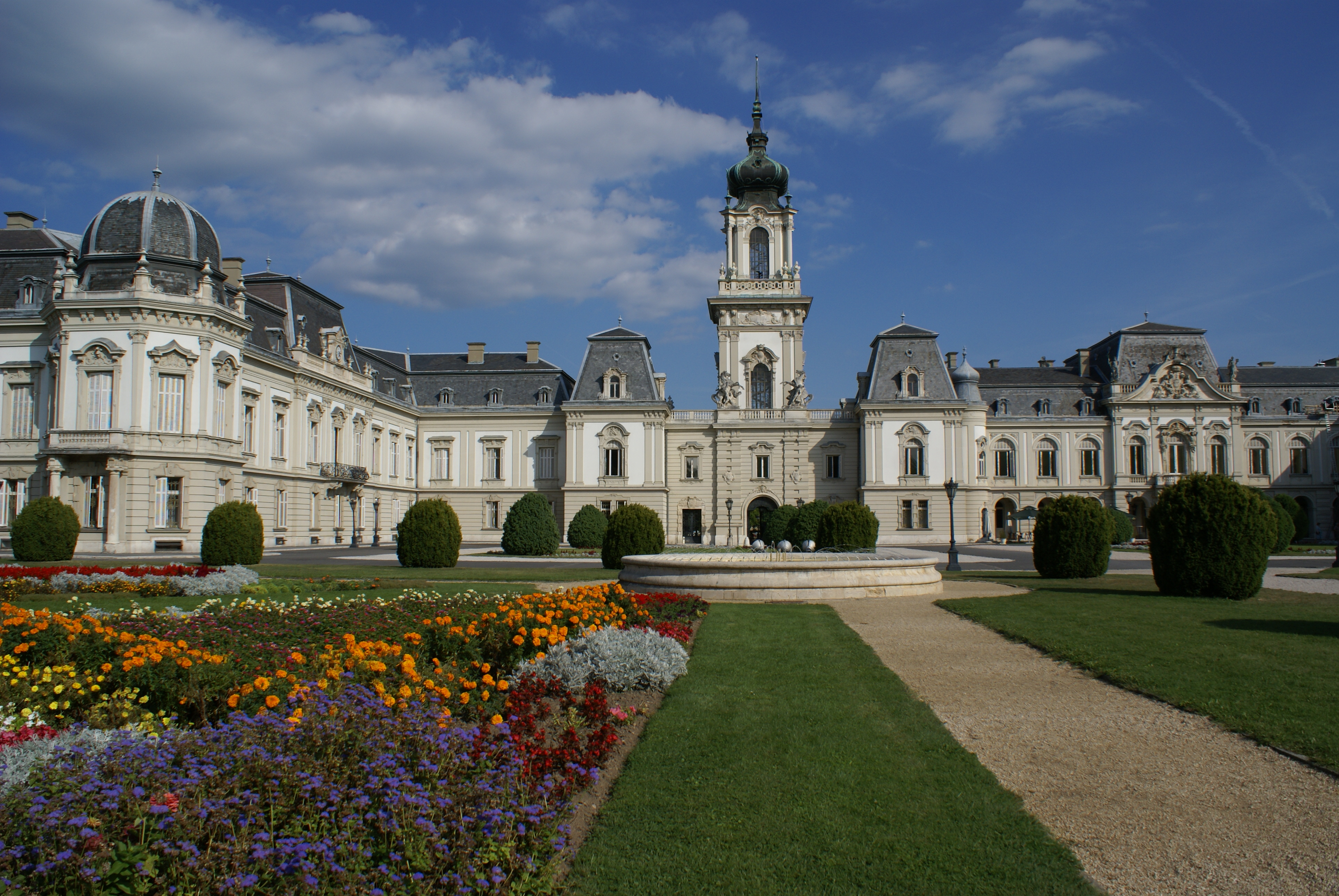 Festetics-kastély (Keszthely, Kastély u. 1 .) This is a photo of a monument in Hungary. Identifier: 10876